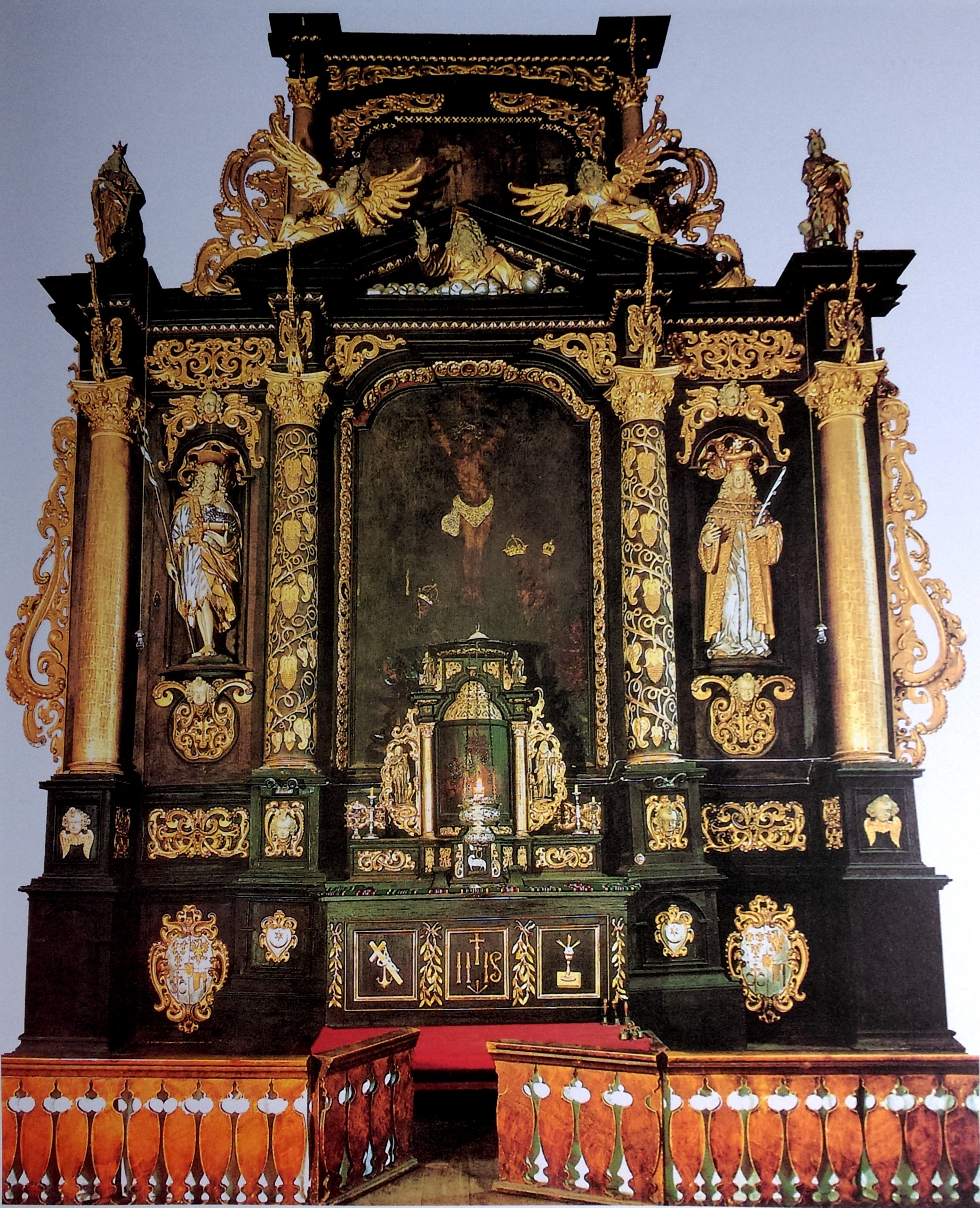 Галоўны алтар Касцёла Іаана Хрысціцеля, XVII ст. Перабудаваны ў XVIII-ХХ стст. Вёска Воўпа, Гродзенская вобласць. Выяўлены 25-й экспедыцыяй Дзяржаўнага мастацкага музея БССР у 1973 годзе.